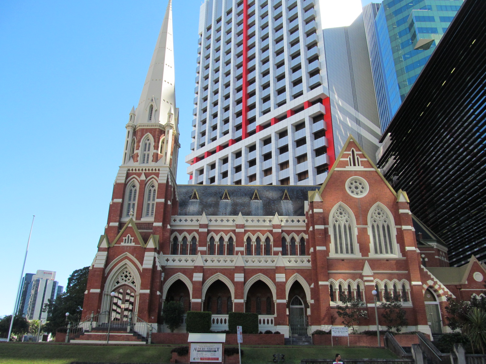 Albert Street Uniting Church in Albert Street, Brisbane, Queensland.